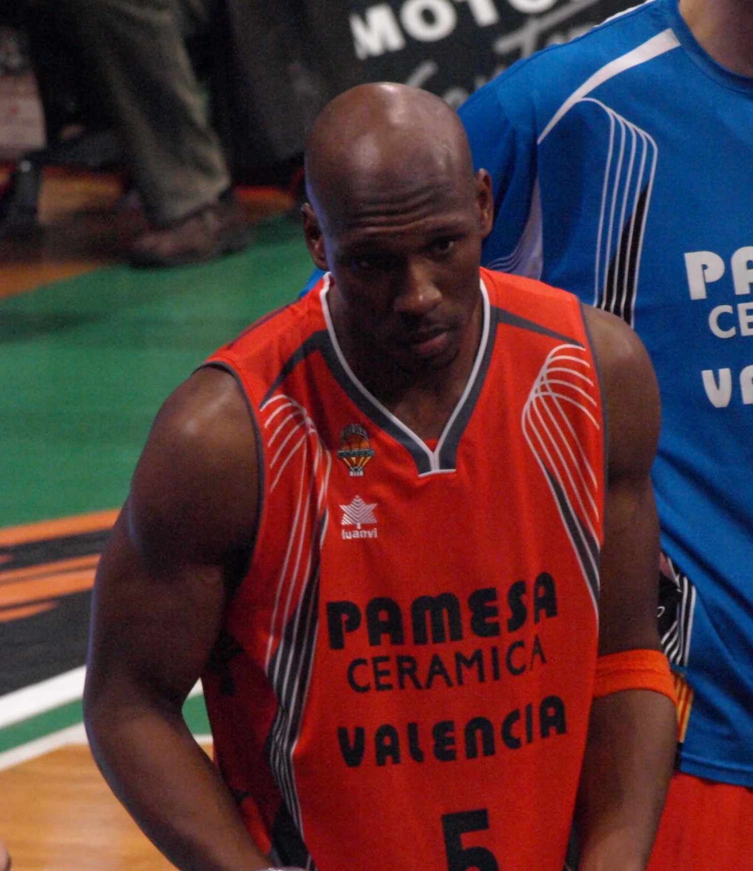 Matt Nielsen con la camiseta del Pamesa Valencia en el Olímpico de Badalona